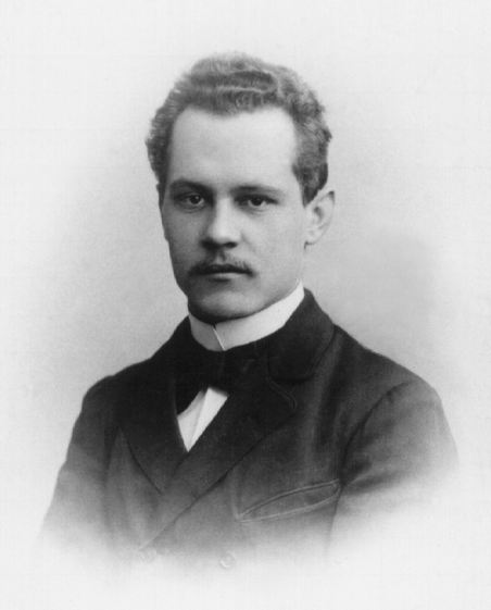 Foto des Physikers und Mathematikers Arnold Sommerfeld